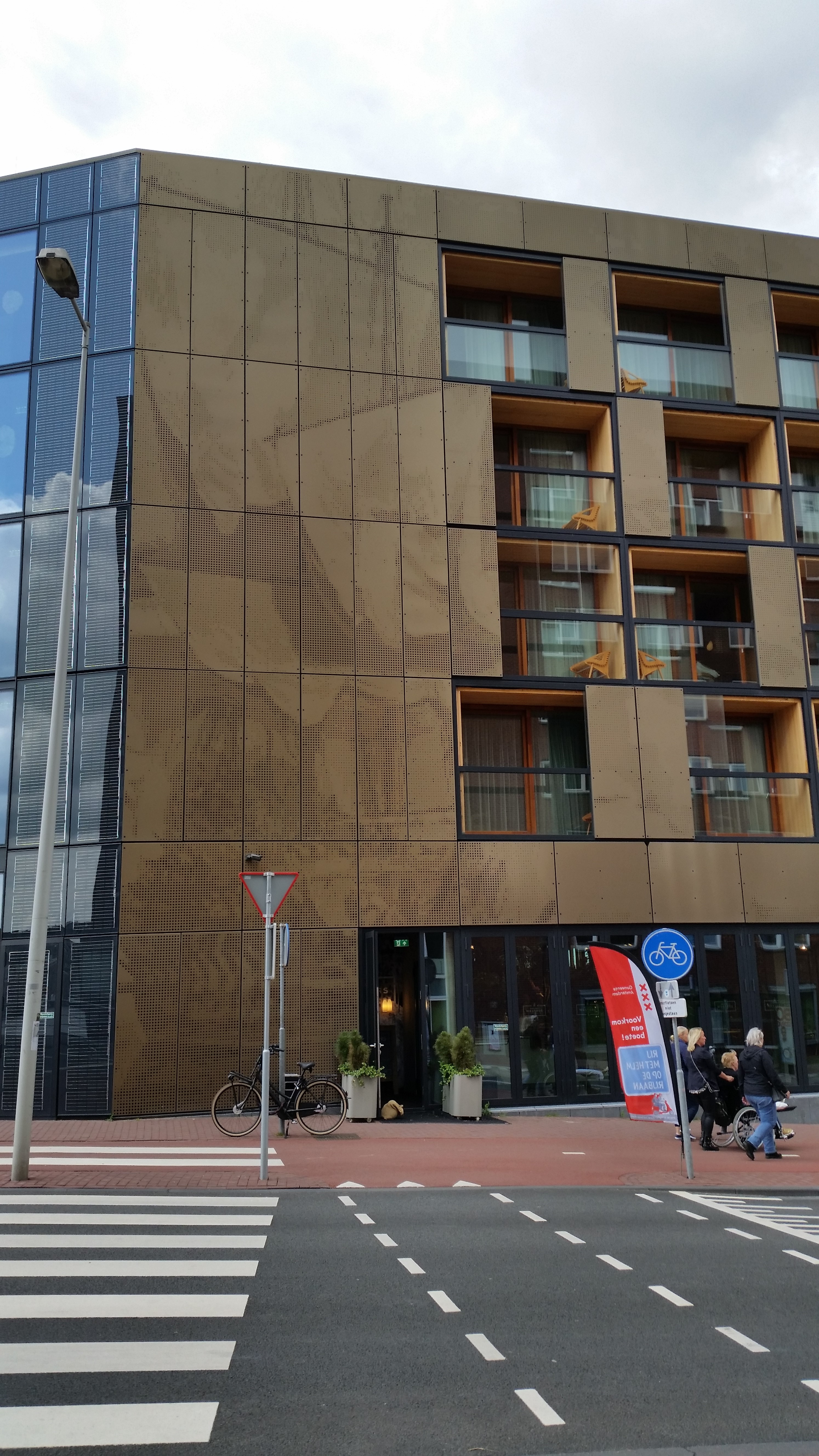 Oostgevel van Javakade 766, Amsterdam met VOC-schip in perforatie